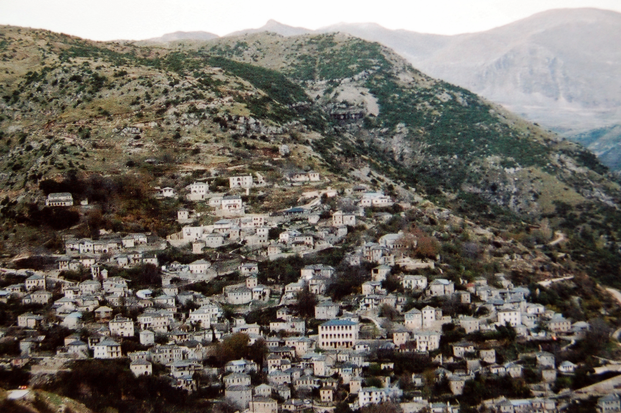 Συρράκο